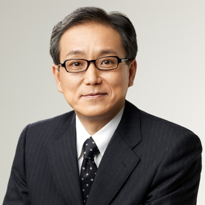 江島潔（自民党参議院山口県第一選挙区支部長）